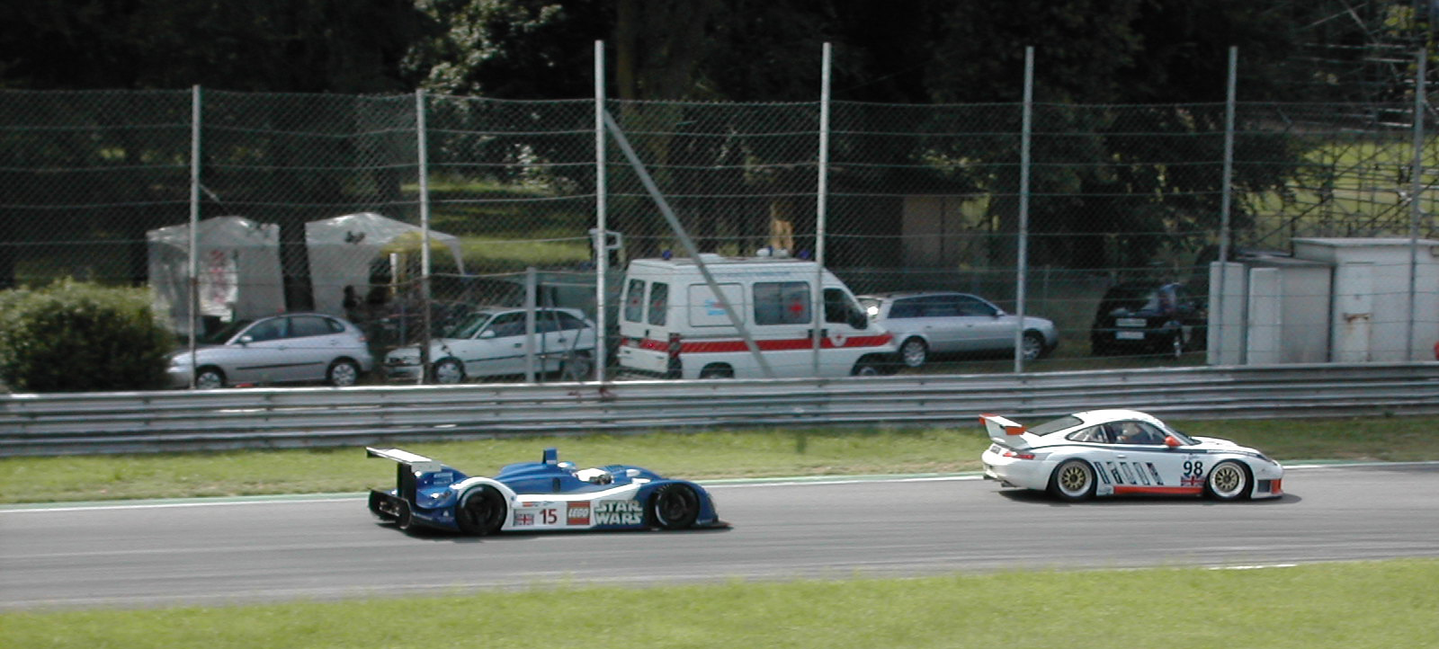 Autore: Lorenzo Stobbione Data: 10/07/2005 Foto personale Creative Creative Commons Attribuzione - Condividi allo stesso modo 2.5 Italia Descrizione: Una Zytek sorpassa una vettura di categoria inferiore alla prima variante durante l'edizione 2005 della 1000 Km di Monza